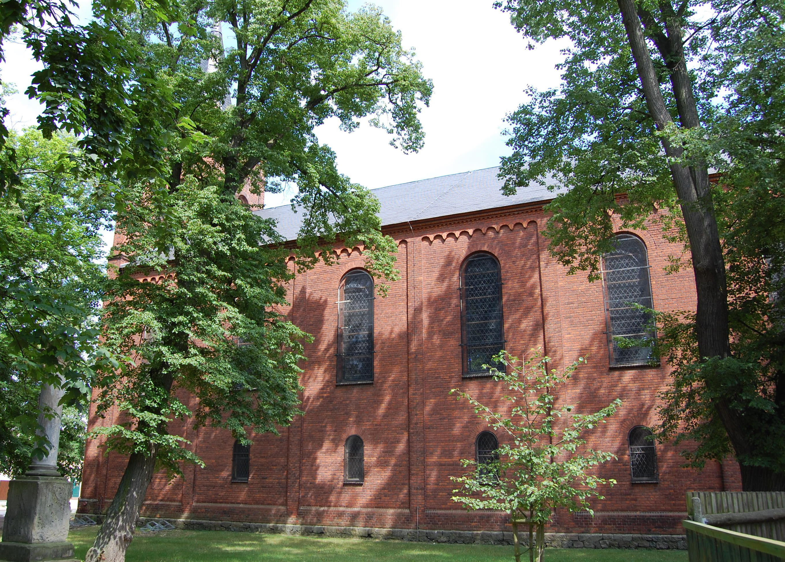 Pauluskirche in Colbitz